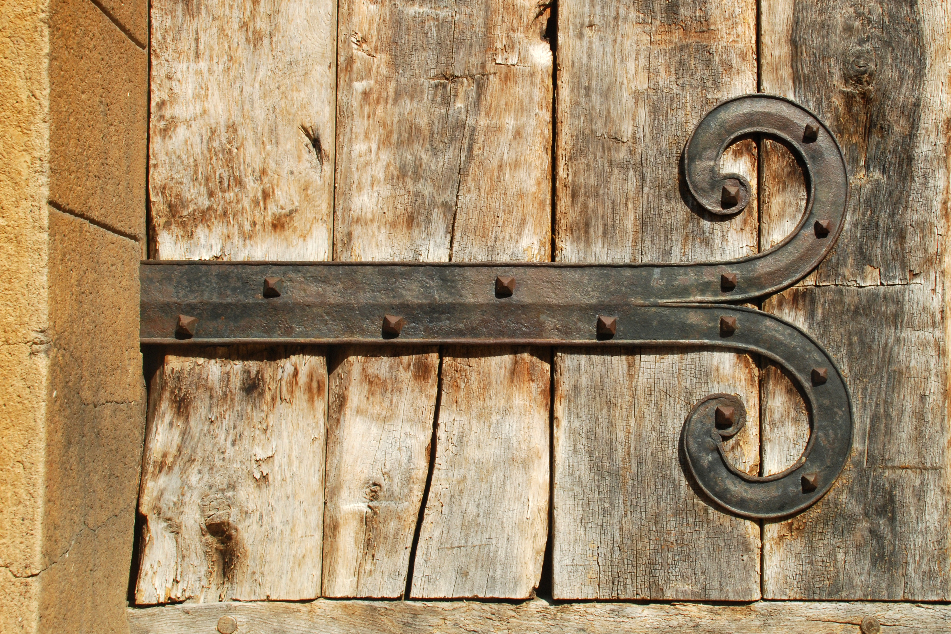 France - Bourgogne - Saône-et-Loire - Tournus - église Saint-Valérien .